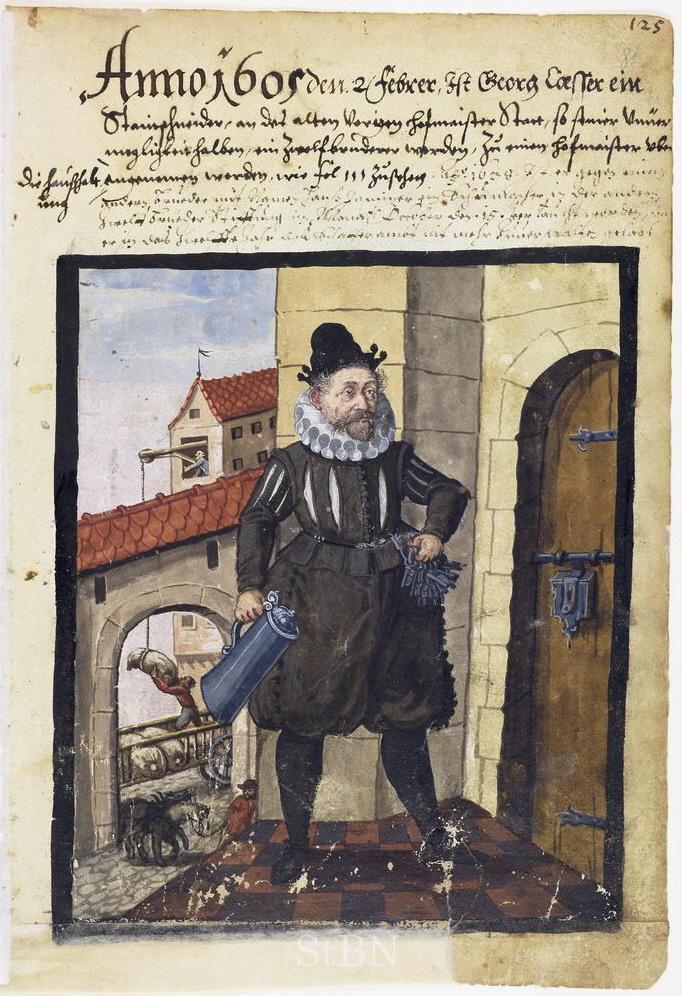 Georg (Georg) Loesser (Loesser; Lesser), Stainschneider; Hofmaister; Schaffer (Steinschneider; Schaffer) Transkription und weitere Informationen